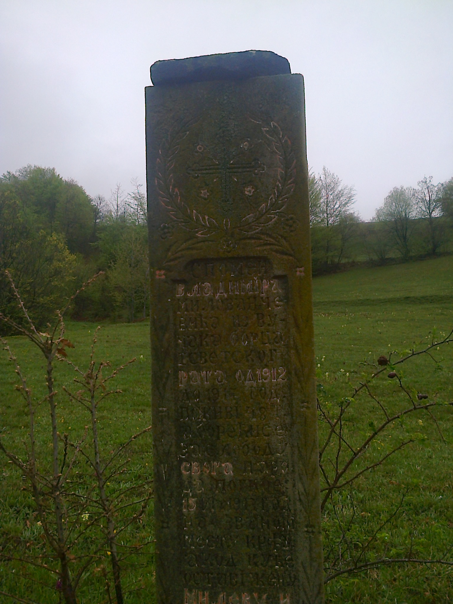 Српски (ћирилица): Крајпуташ